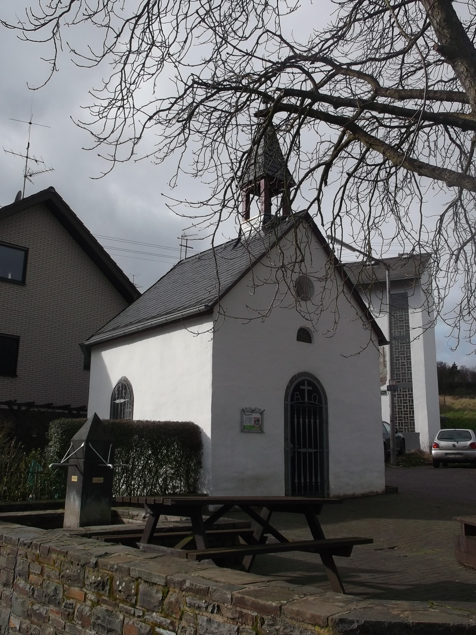 Dieblich-Mariaroth, Marienkapelle